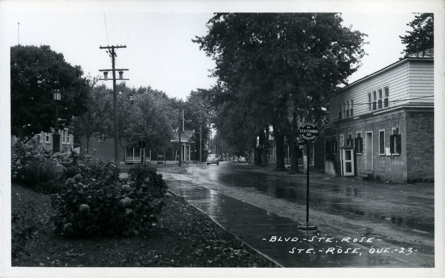 carte postale, L. Charpentier